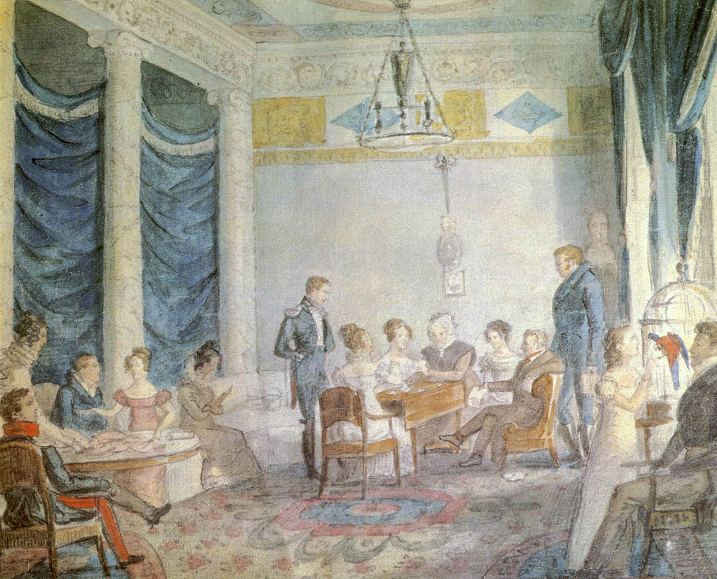 "Гостиная Олениных. Акварель неизвестного художника. 1820-е гг. Государственный Литературный музей. Москва"